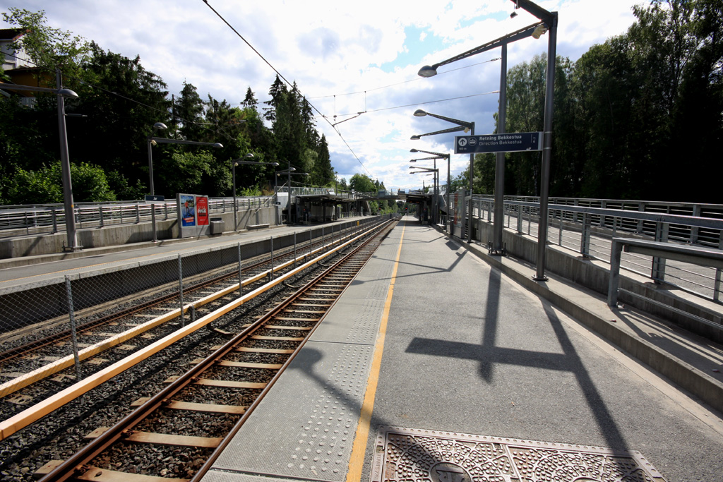 Jar T-banestasjon sett fra vestgående Spor 2. I retning mot Ringstabekk.